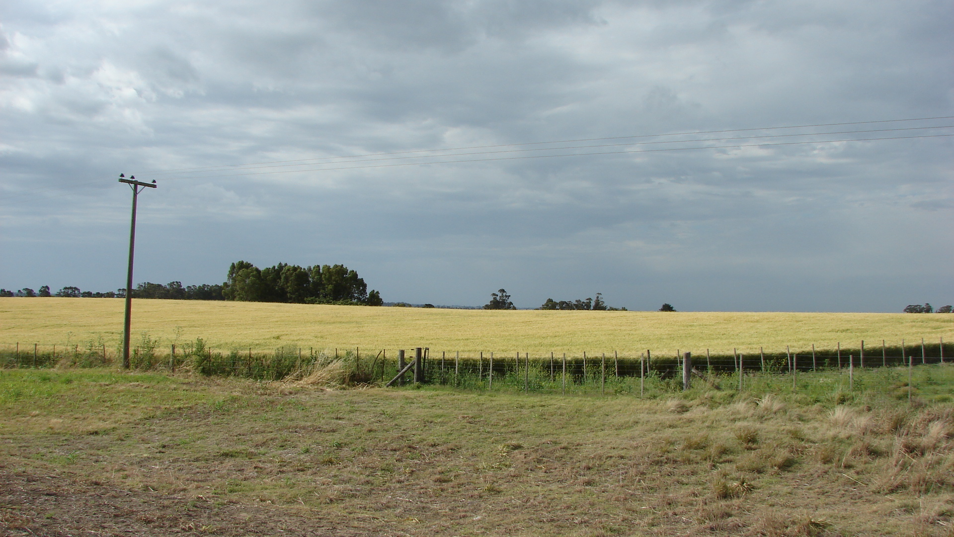 Gral Juan Madariaga, Buenos Aires, Argentina